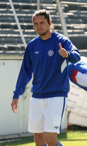 Entrenamiento en el Estadio Azul